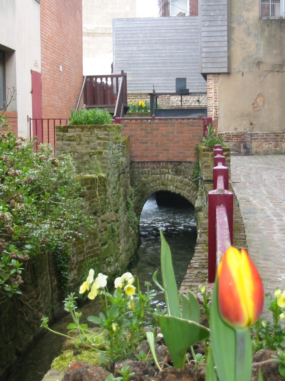 Riviére à jour ruelle Papavoine Bolbec